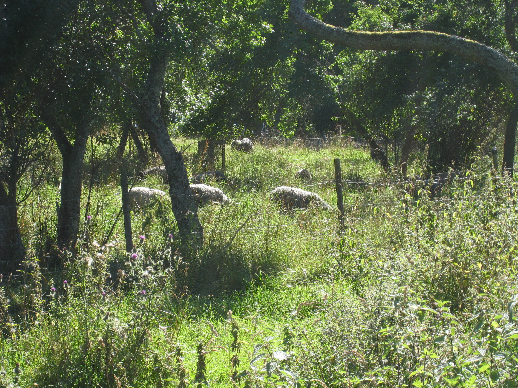 Betande får vid Hummelmora torp, Hummelmora hage, Görvälns naturreservat, Järfälla kommun.